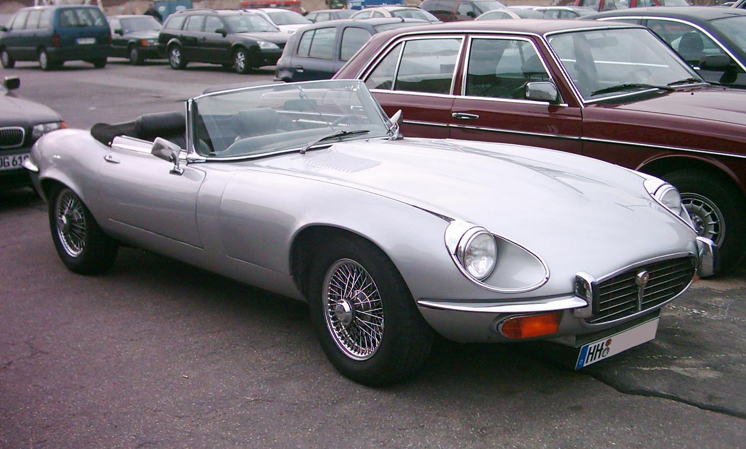 Jaguar E-Type, Hamburg.